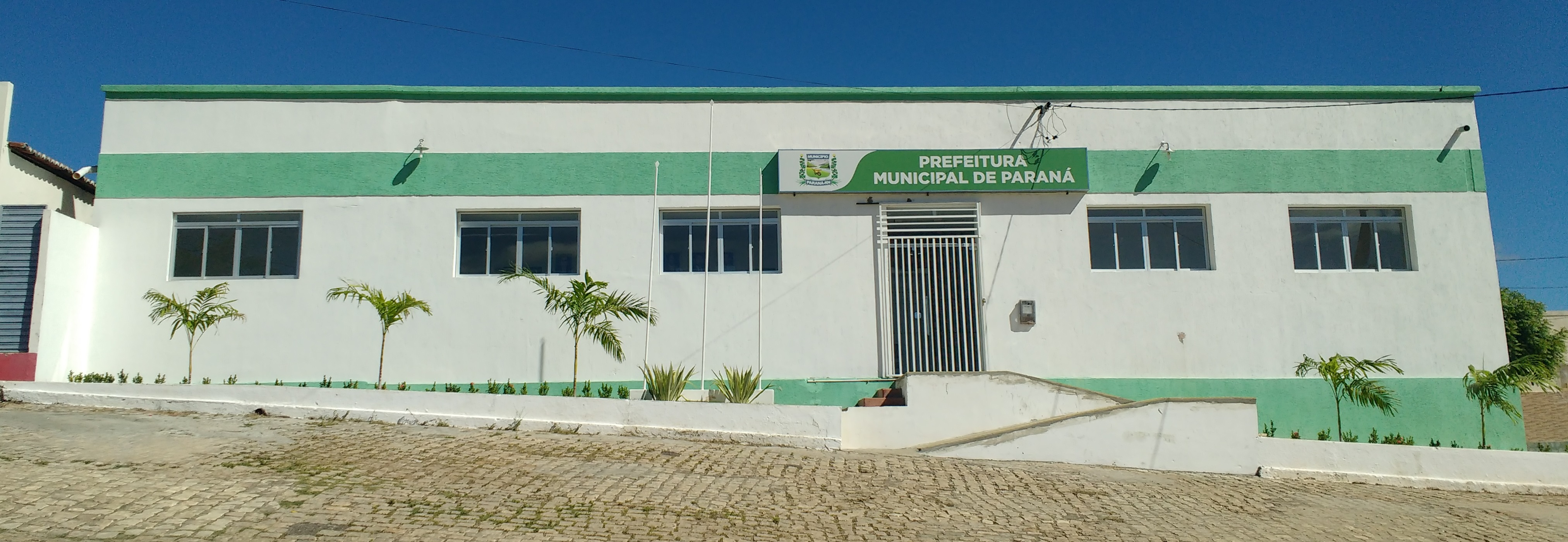 Prefeitura Municipal de Paraná, Rio Grande do Norte (Brasil).